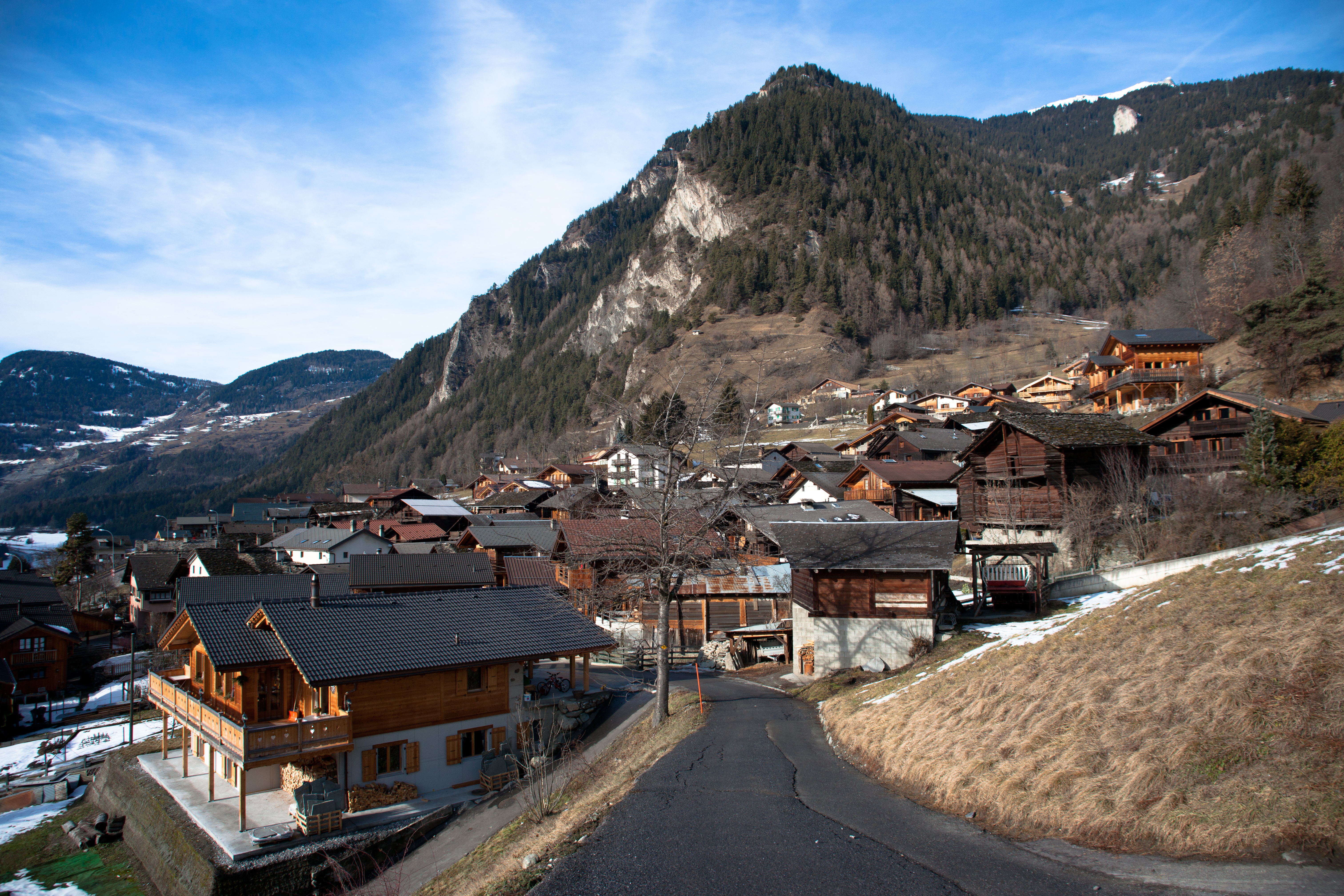 Cotterg, commune de Bagnes, canton du Valais, Suisse.